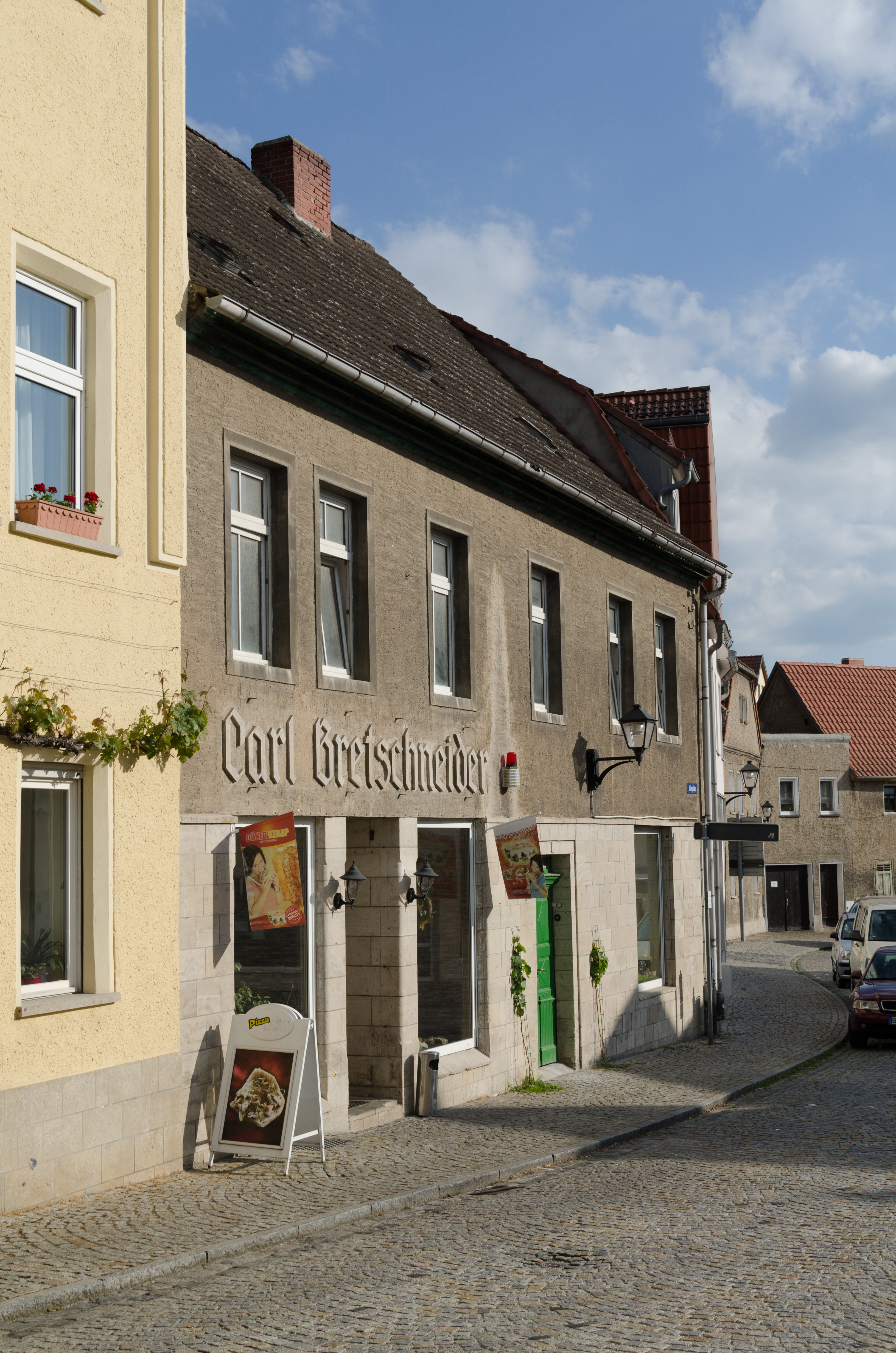 Freyburg an der Unstrut, Jahnplatz 6